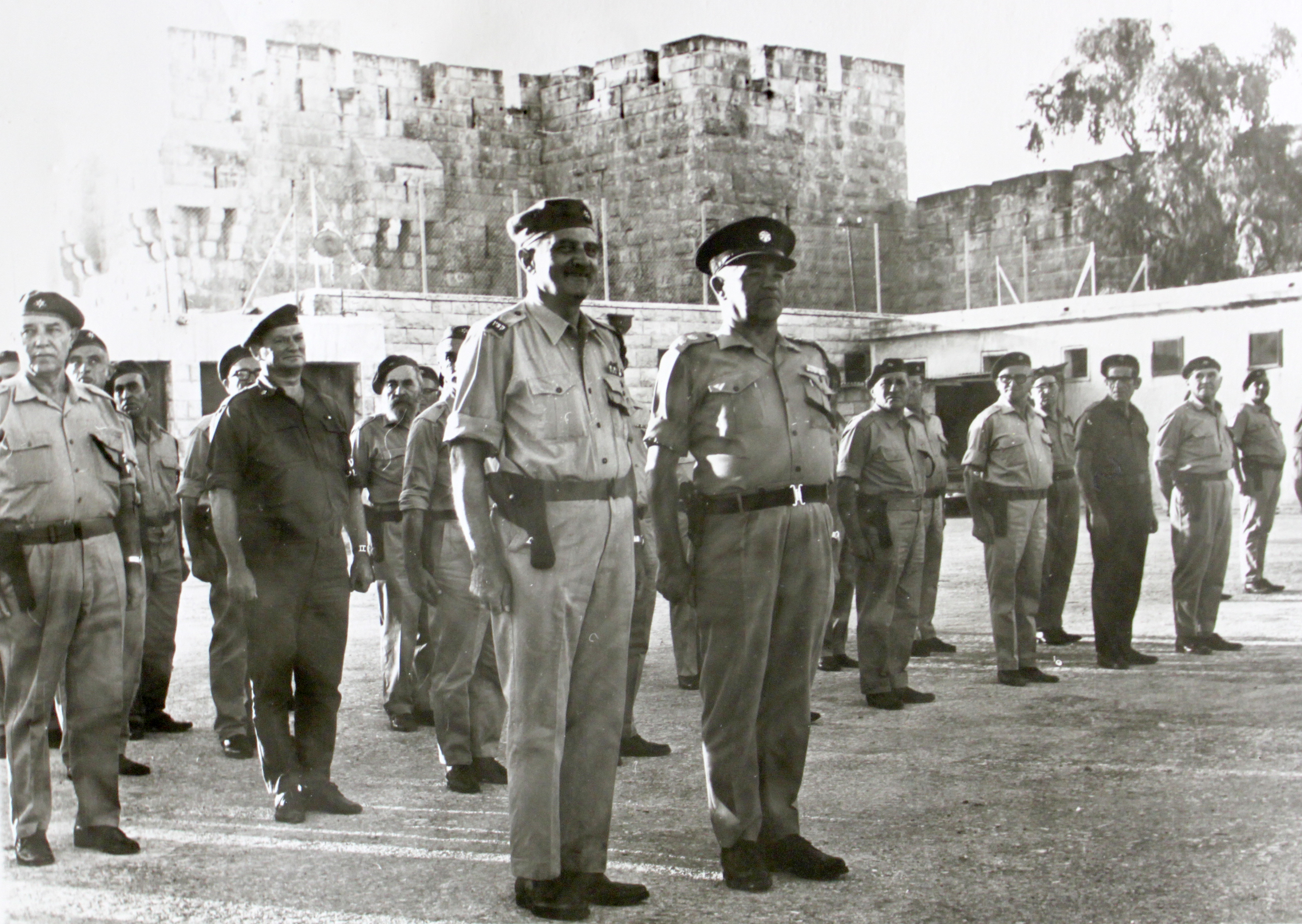 טקס פתיחת תחנת העיר העתיקה ברחבת הקישלה, 31.7.1967